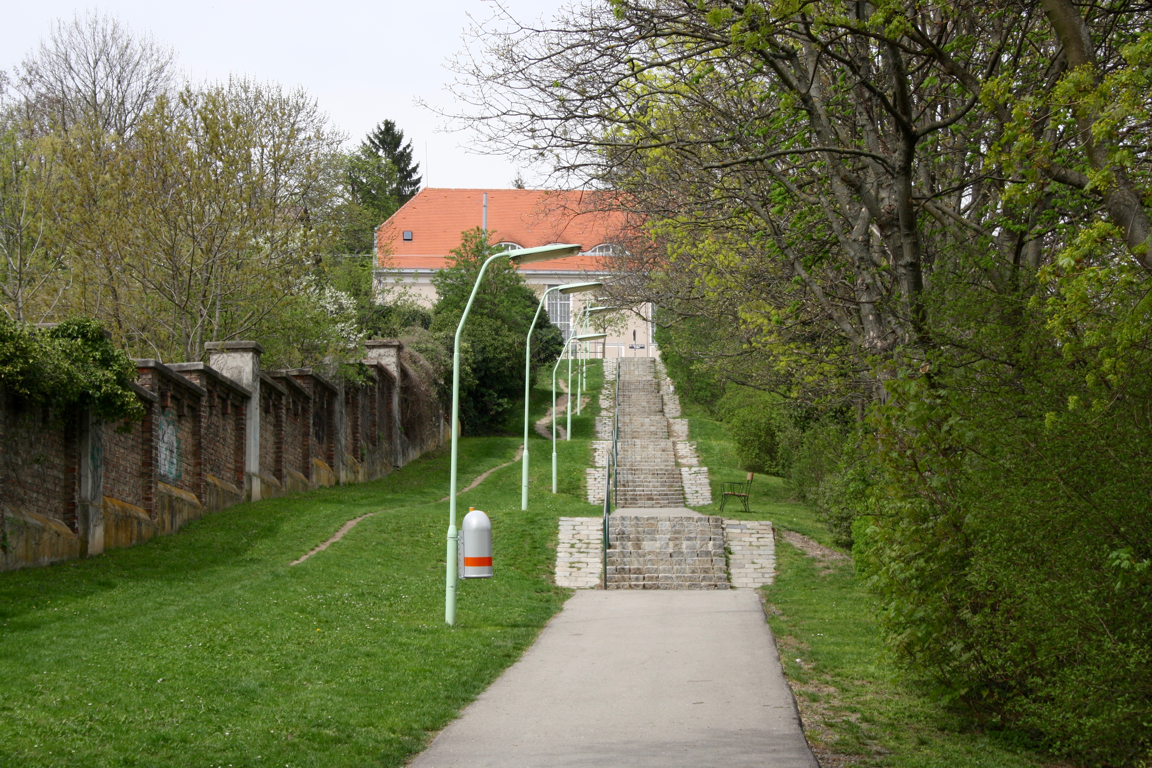 Stiege am Hansl-Schmid-Weg in Wien-Ottakring, links Mauer zum Otto-Wagner-Spital.